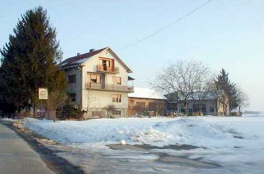 Naselje Stjepana Radića - House